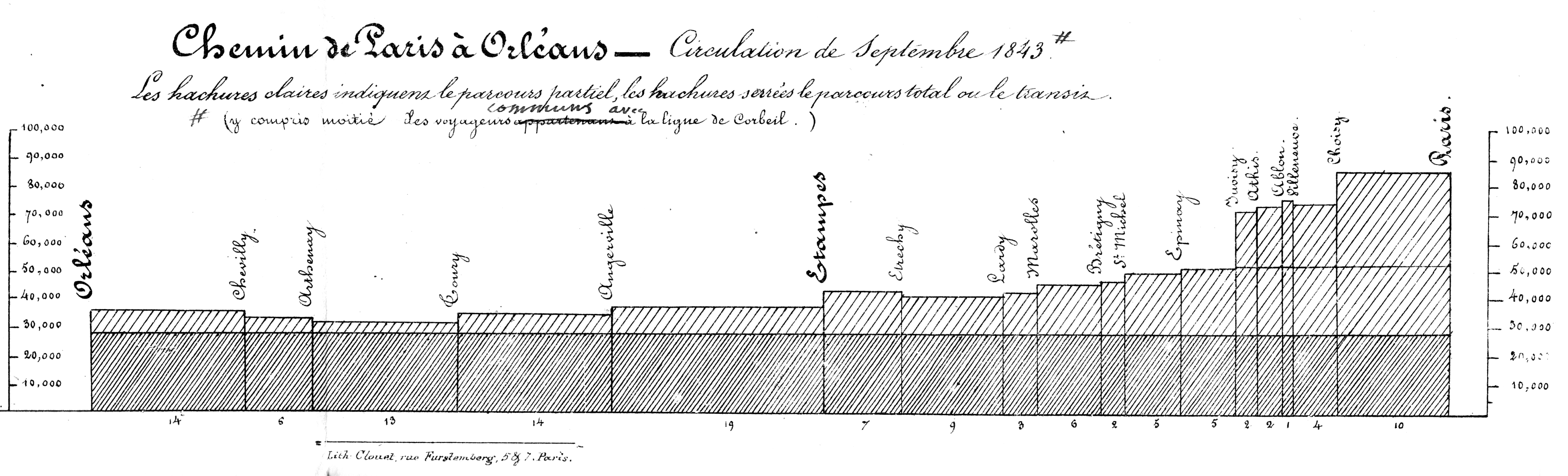 Circulation des voyageurs sur le chemin de fer Paris-Orléans en septembre 1843.